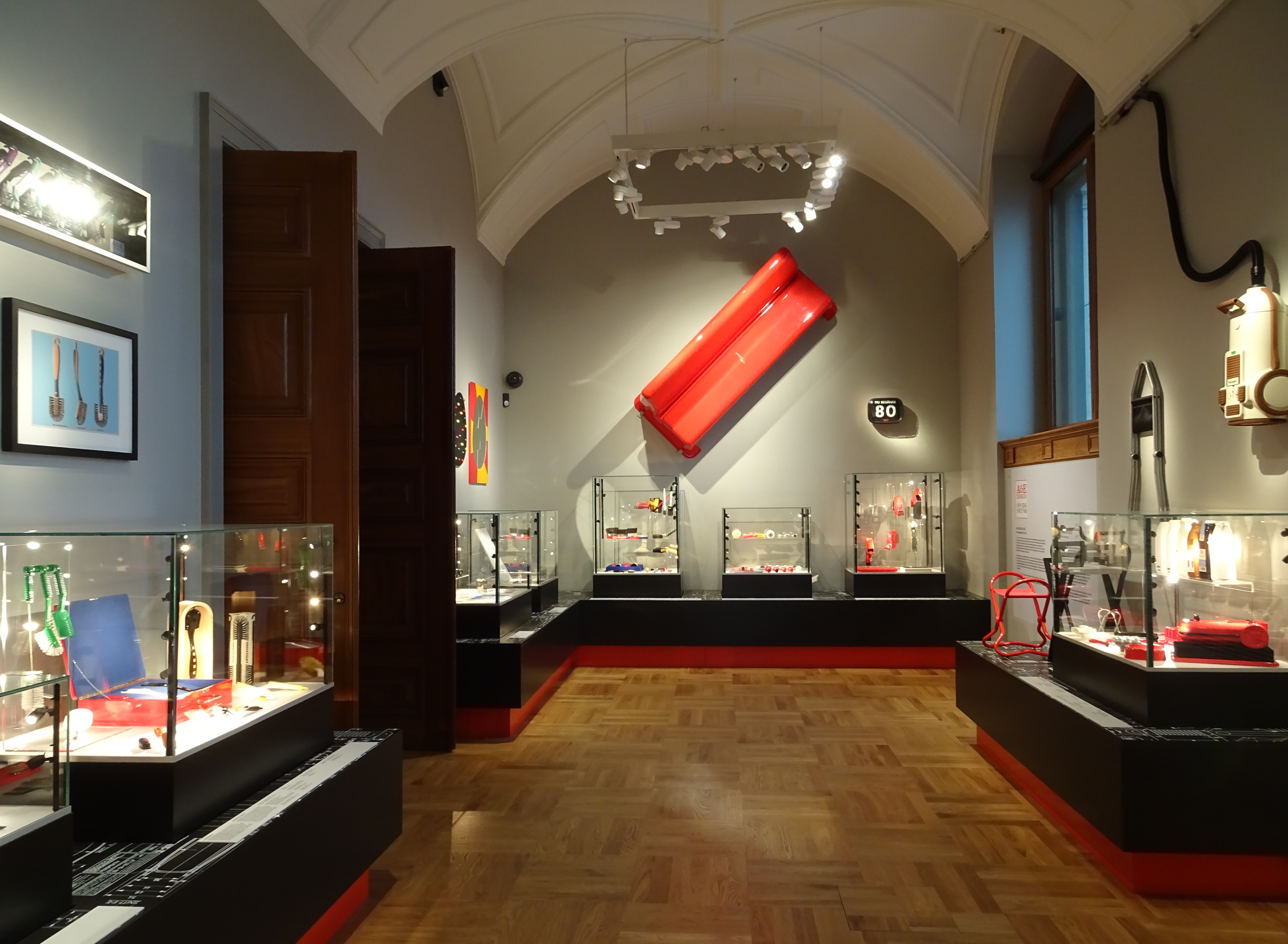 A&E Design, specialutställning på Nationalmuseum